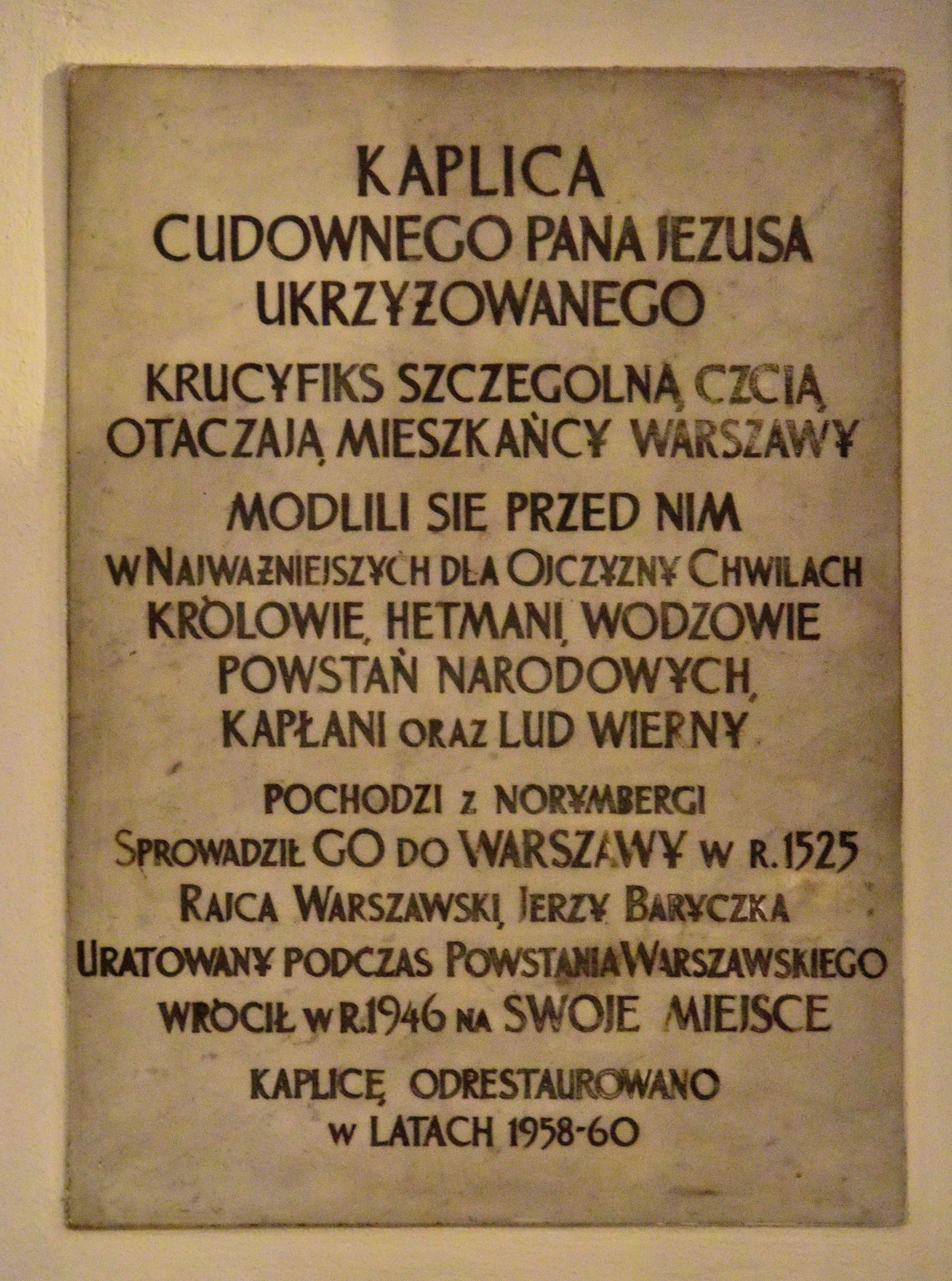 Tablica przy kaplicy Cudownego Pana Jezusa Ukrzyżowanego (Baryczków) w bazylice archikatedralnej św. Jana Chrzciciela w Warszawie